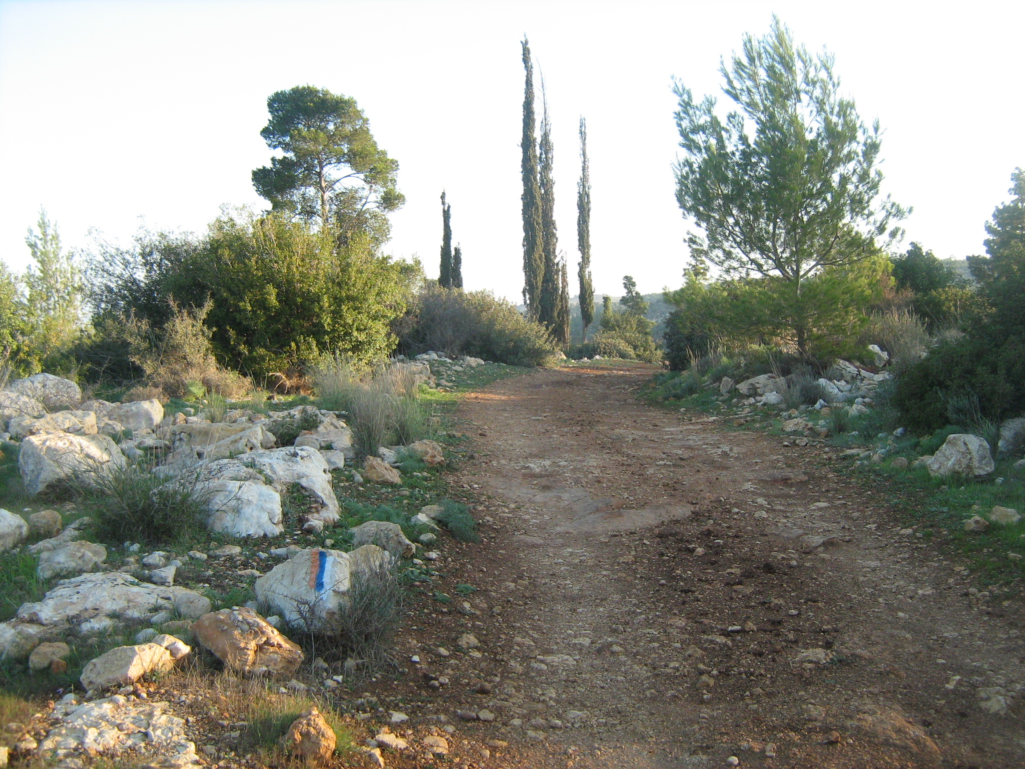 לאורך דרך בורמה